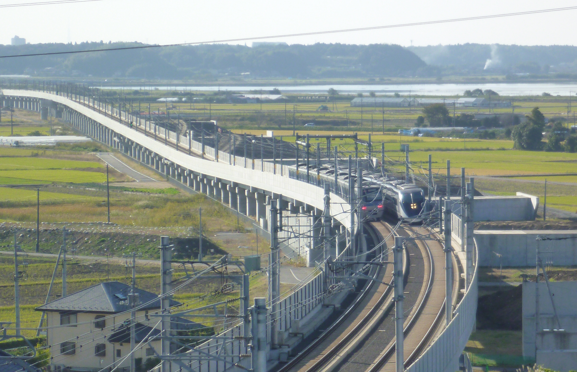 アクセス特急とスカイライナーのすれ違い